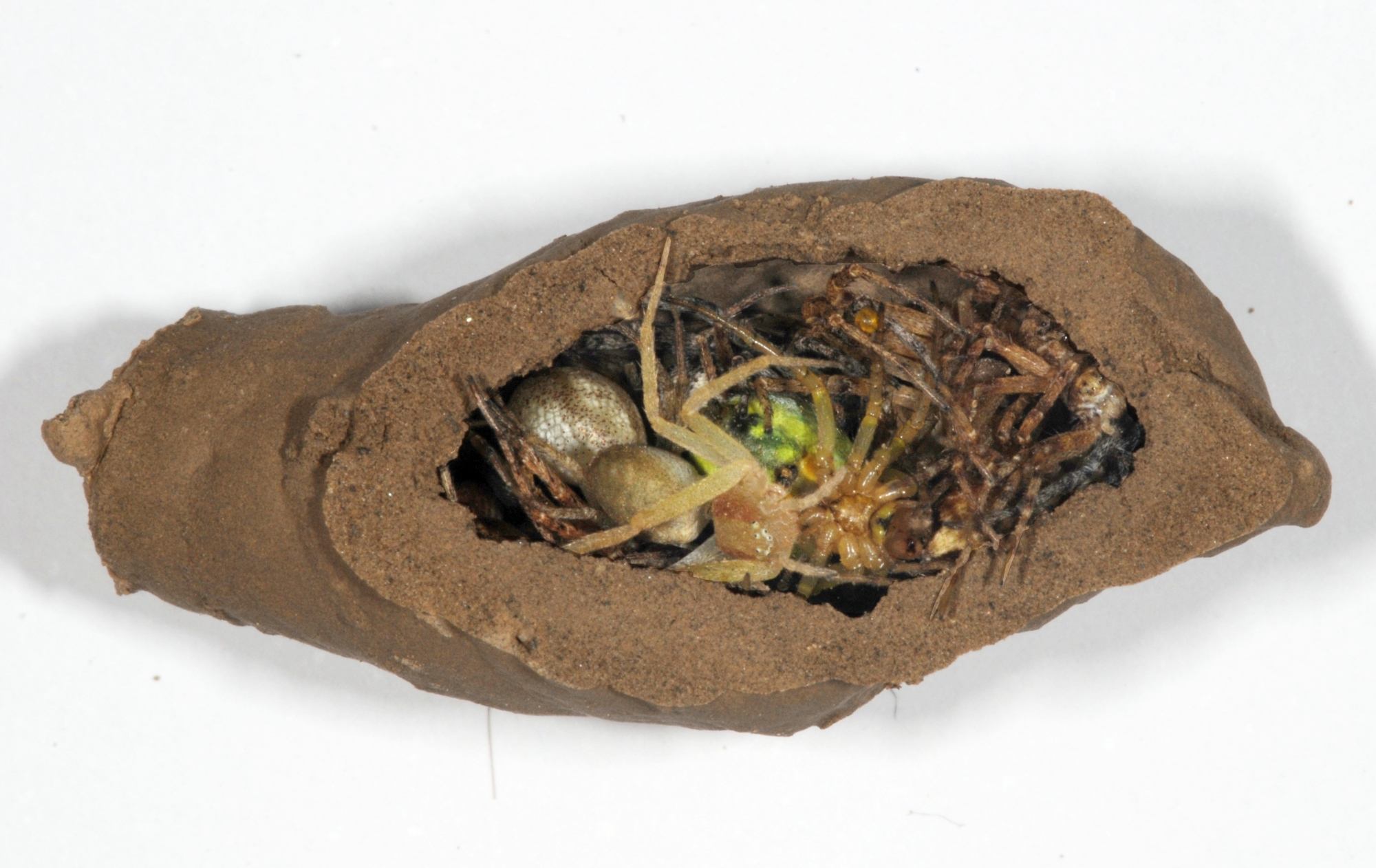 Mörteltopf hinten geöffnet mit den von Sceliphron curvatum eingetragenen Spinnen, Wiesbaden, Hessen, Deutschland